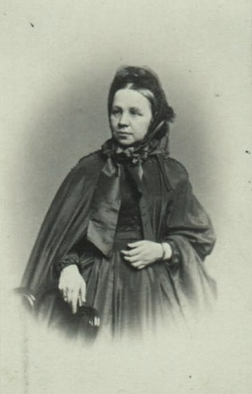 Мария Алексеевна Поленова (1816—24.12.1895)